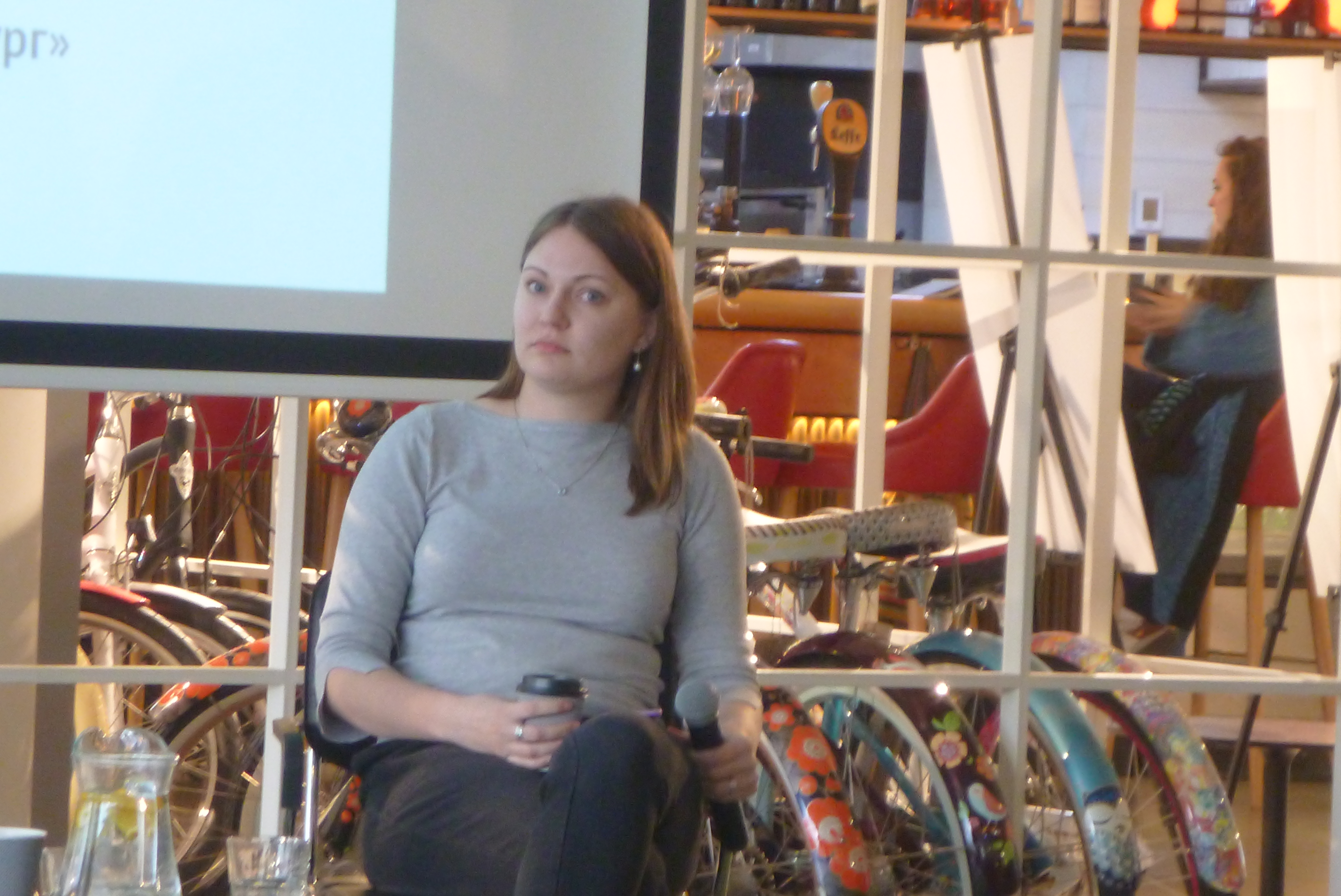 Ольга Балюк из Знак.ком в Ельцин-центре 26 июня 2019 года